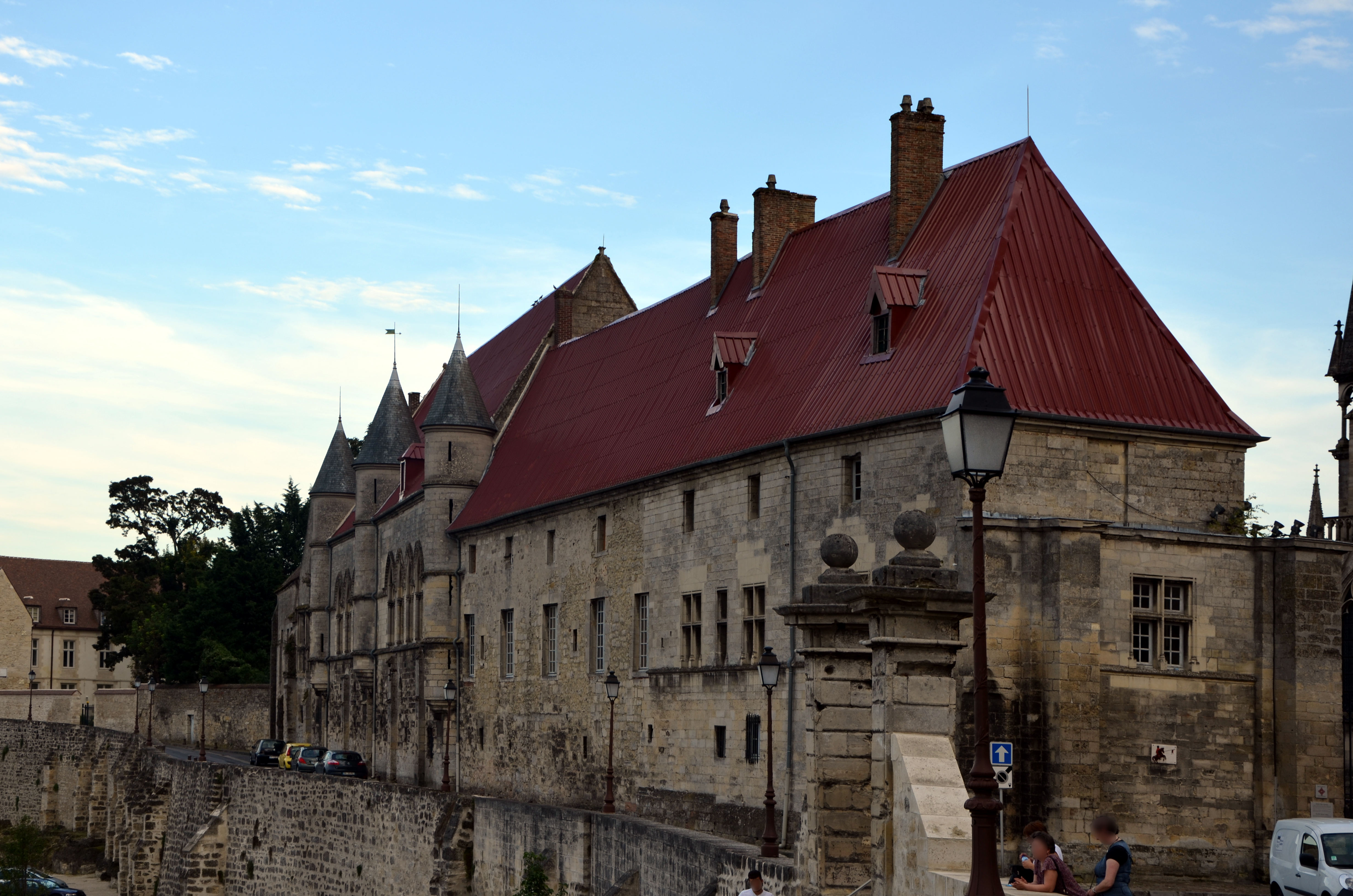 Ancien palais épiscopal de Laon, Aisne, France .